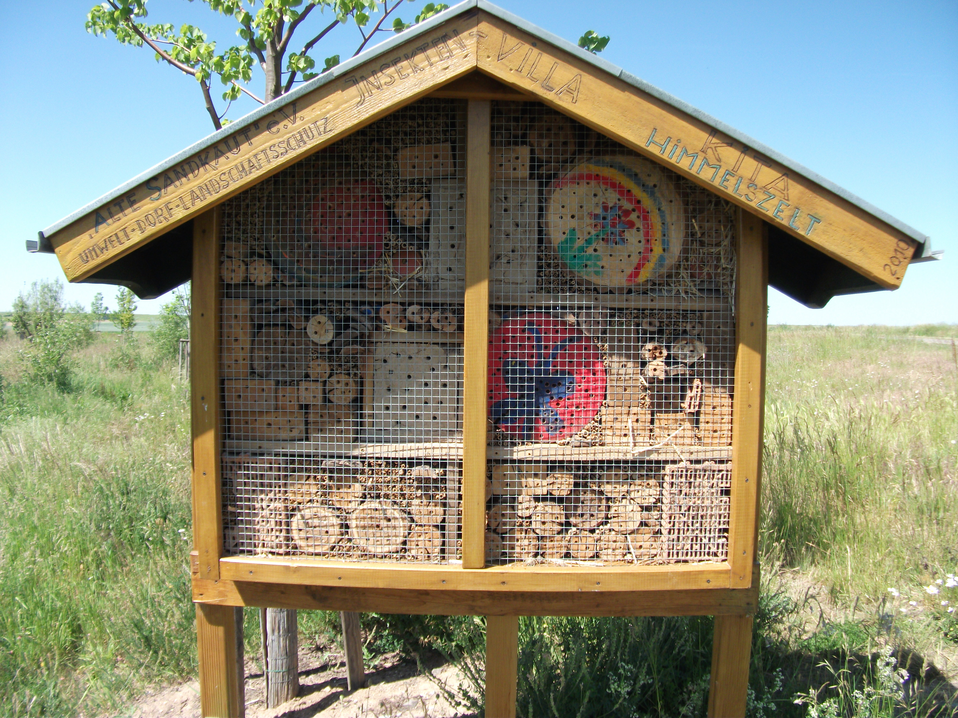 "Insektenvilla" am Floßbach (Eckbach) bei Dirmstein, gefertigt durch den Umweltverein "Alte Sandkaut"